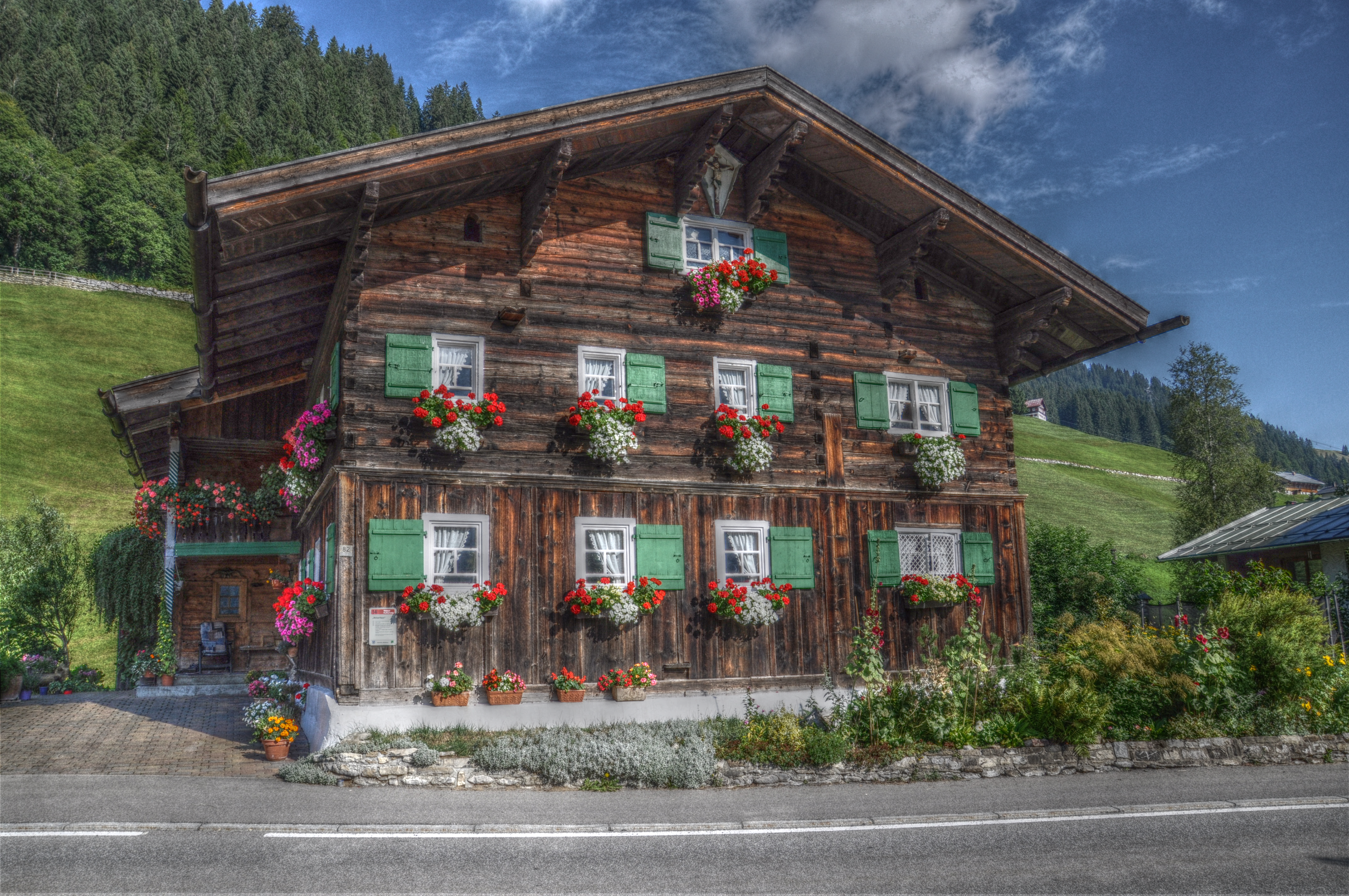 Ein Beispiel für die typische Wohnbebauung im Kleinwalsertal.